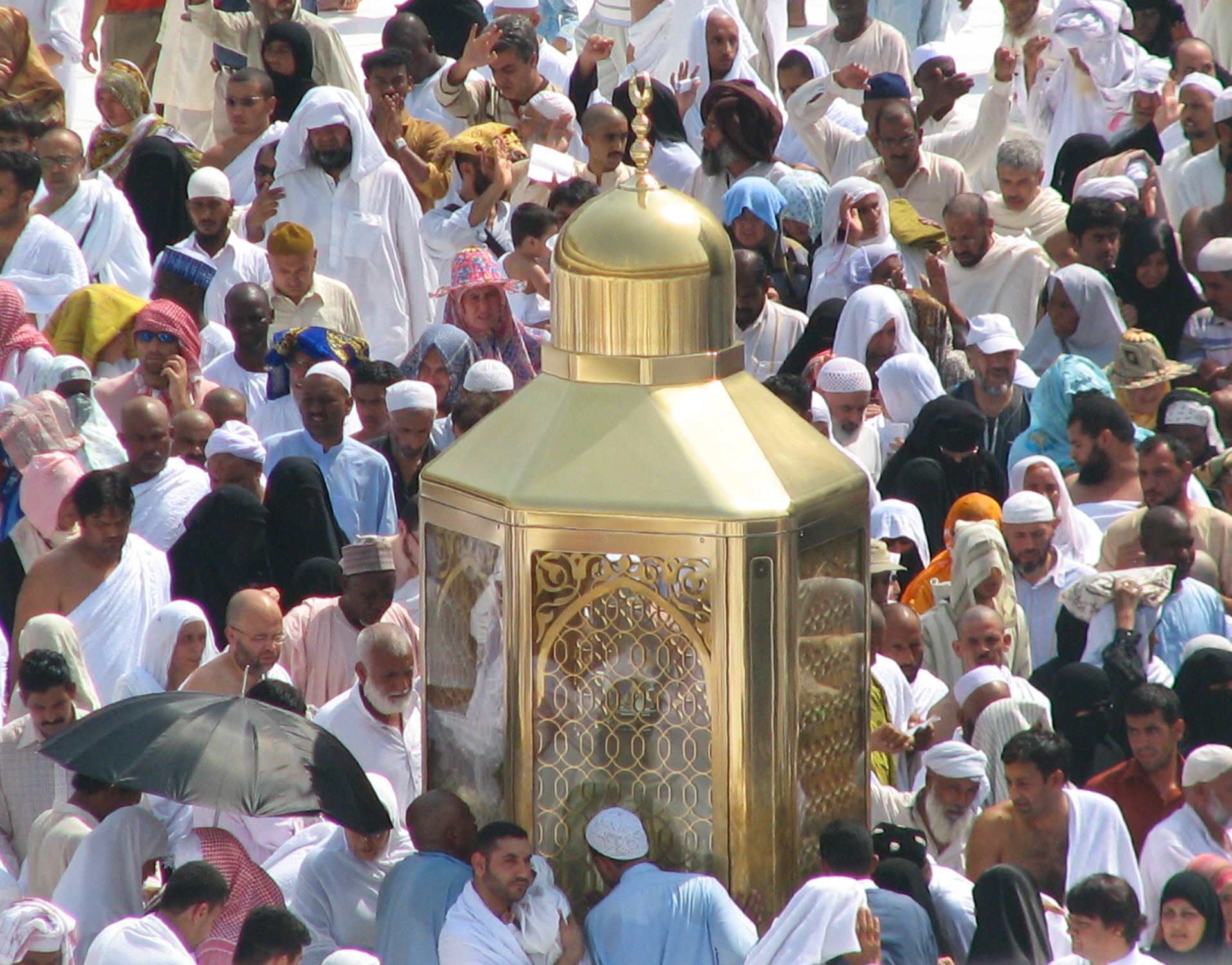 صورة لمقام إبراهيم ، من المسجد الحرام بمكة